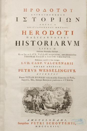 Herodoti Halicarnassei Historiarvm libri IX :musarum nominibus inscripti Gr. et Lat. ex Lavr. Vallae interpretatione, cum adnotationibus Thomae Galei et Iacobi Gronovii ; editionem curavit et suas itemque Lvd. Casp. Valckenarii notas adiecit Petrvs Wesselingivs ; accedvnt praeter vitam Homeri varia ex priscis scriptoribus de Persis, Aegyptiis, Nilo, Indisque excerpta et praesertim ex Ctesia. (Amsterdam, 1781)